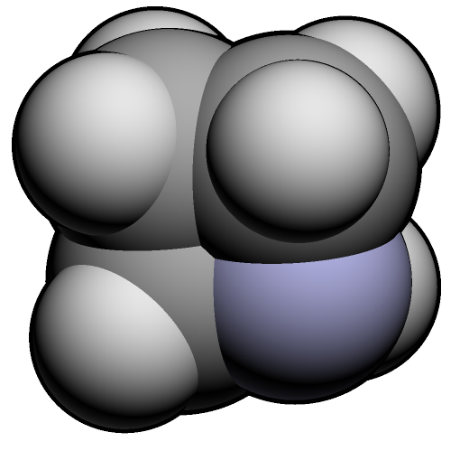 3d molecular spacefill of Azetidine